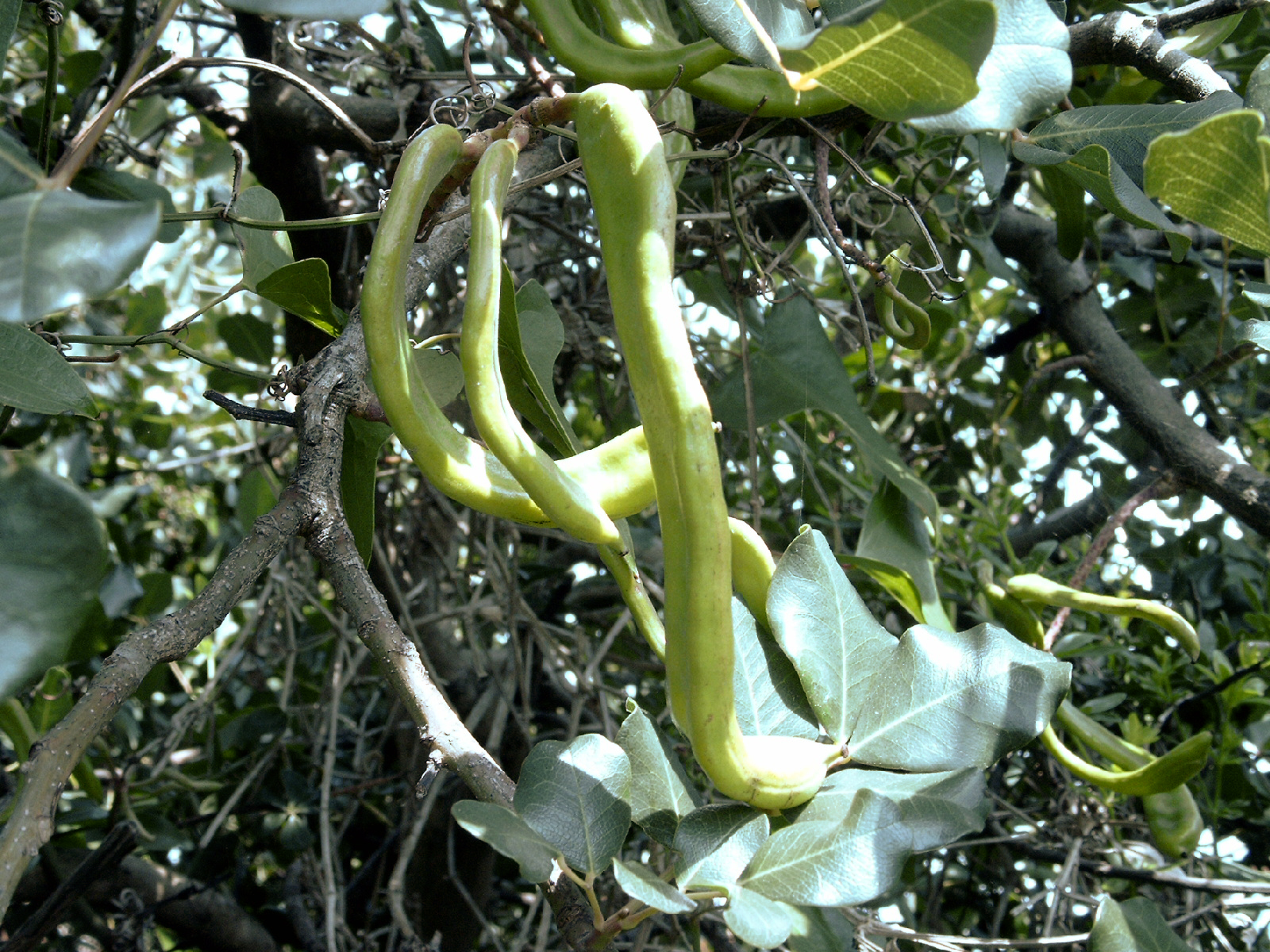 Algarroba fruto de la Ceratonia siliqua Name Ceratonia siliqua Family Fabaceae